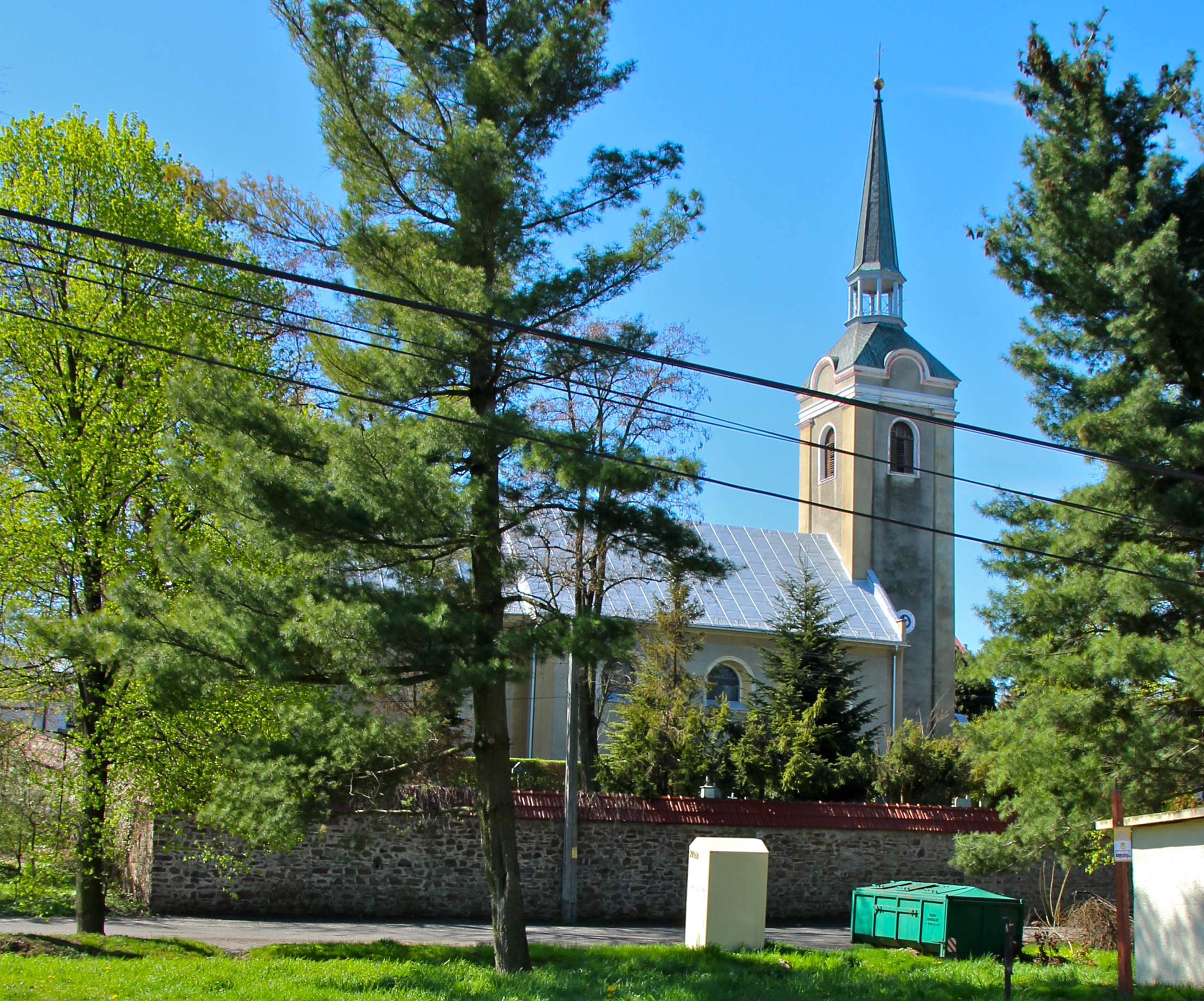 Gołuszowice - kościół parafialny p.w. św. Marcina, XVI, 1718, 1837. (zabytek nr 118/54 z 25.08.1954 oraz 1170/66 z 19.02.1966)